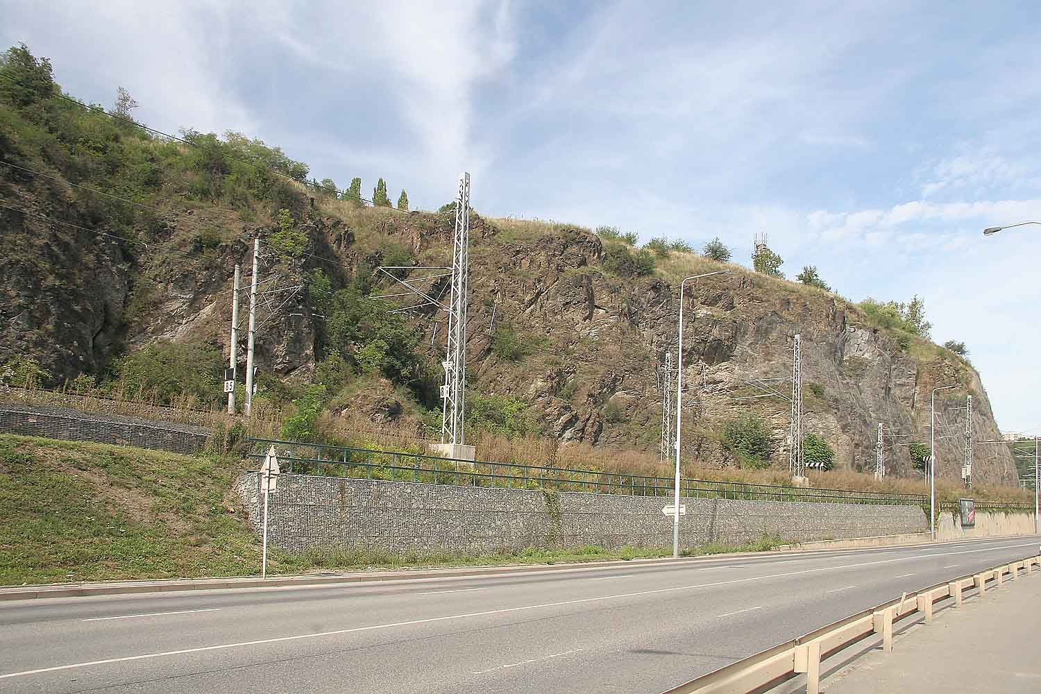 Přírodní památka Podbabské skály v Praze 6 - Sedlci